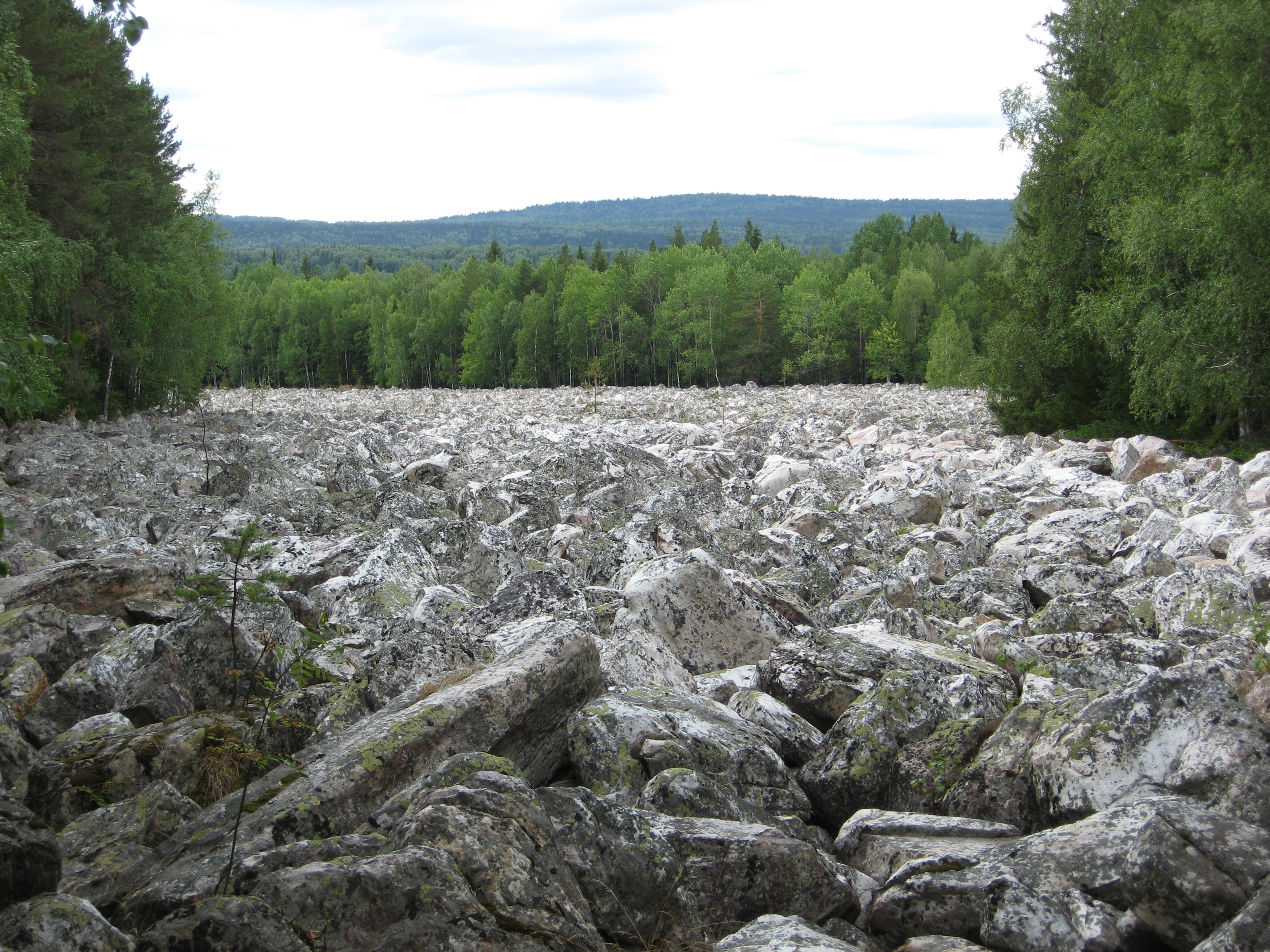 Таганайский природный комплекс, This image is related to the protected area of Russia number 7410002